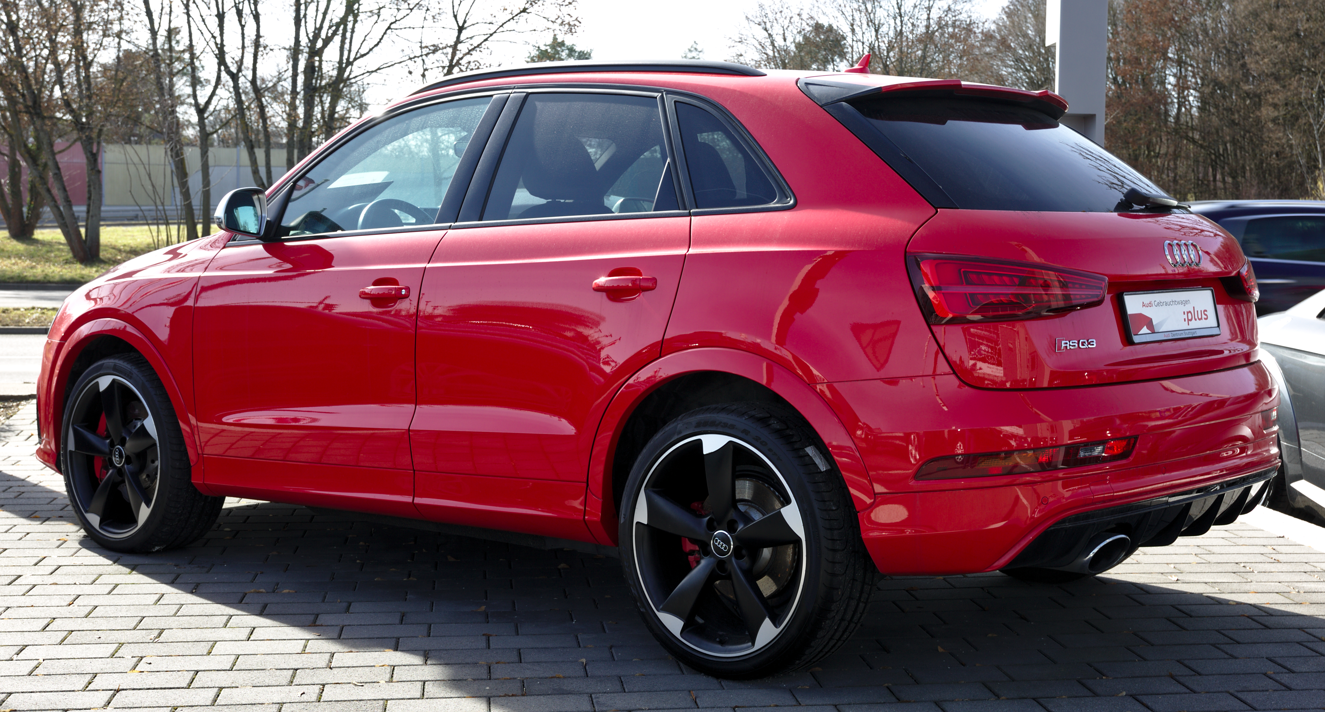 Audi RS Q3 in Stuttgart-Vaihingen